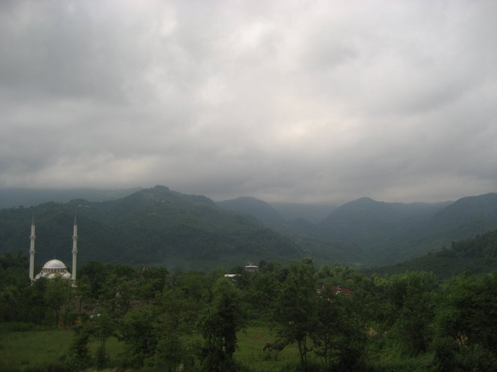 Salıpzarı, Alan köyünden bir manzara